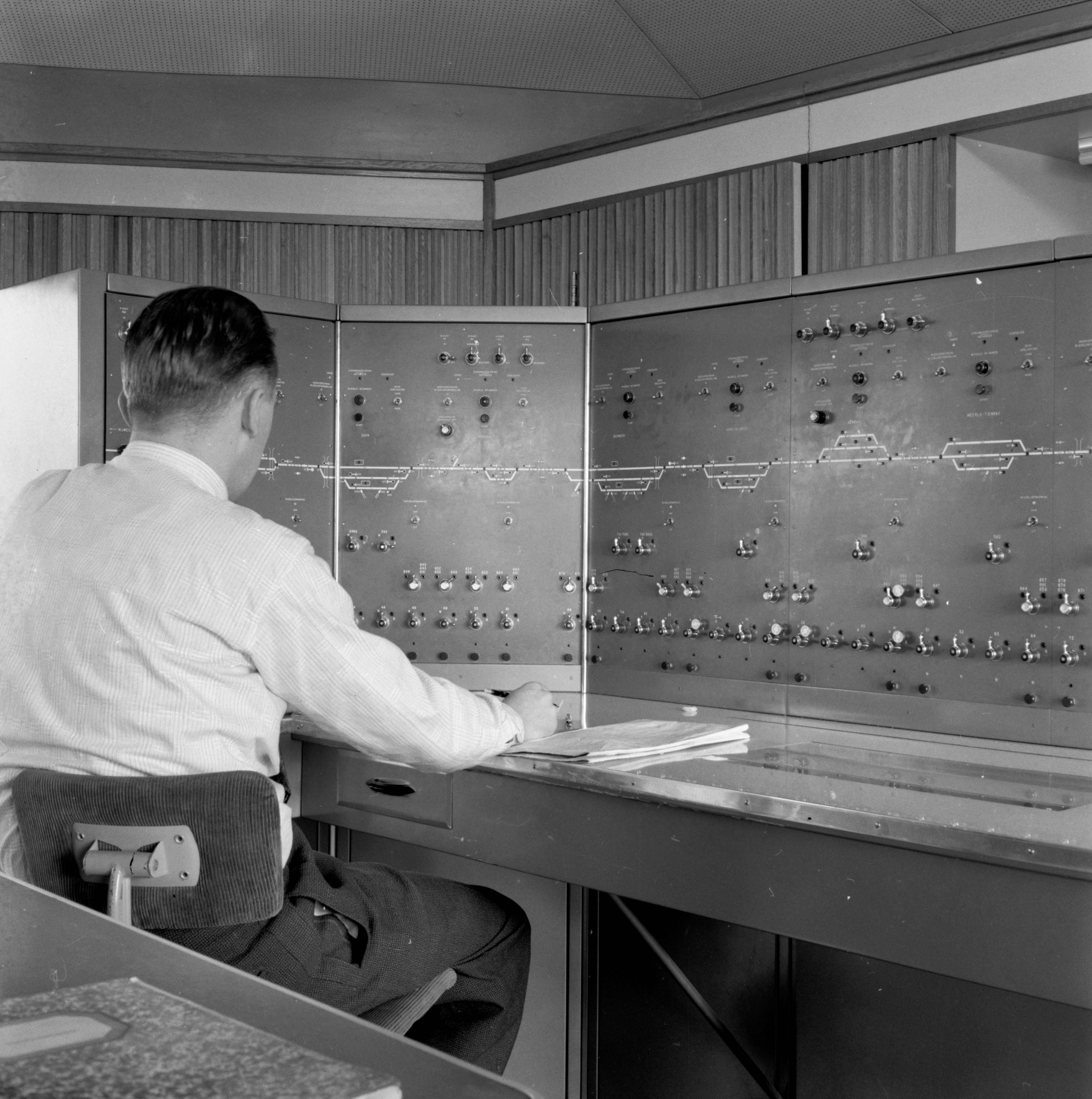 Interieur van de Centrale Verkeersleidingspost (CVL-post) van de N.S. te Nijmegen: de treindienstleider bij het bedieningstableau.N.B. Op het baanvak Nijmegen-Blerick werd in 1960/1961 bij wijze van proef de Centrale Verkeersleiding geïntroduceerd.